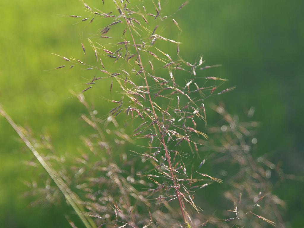 Capillipedium parviflorum ヒメアブラススキ 日本・和歌山県・田辺市 2008.11.1撮影